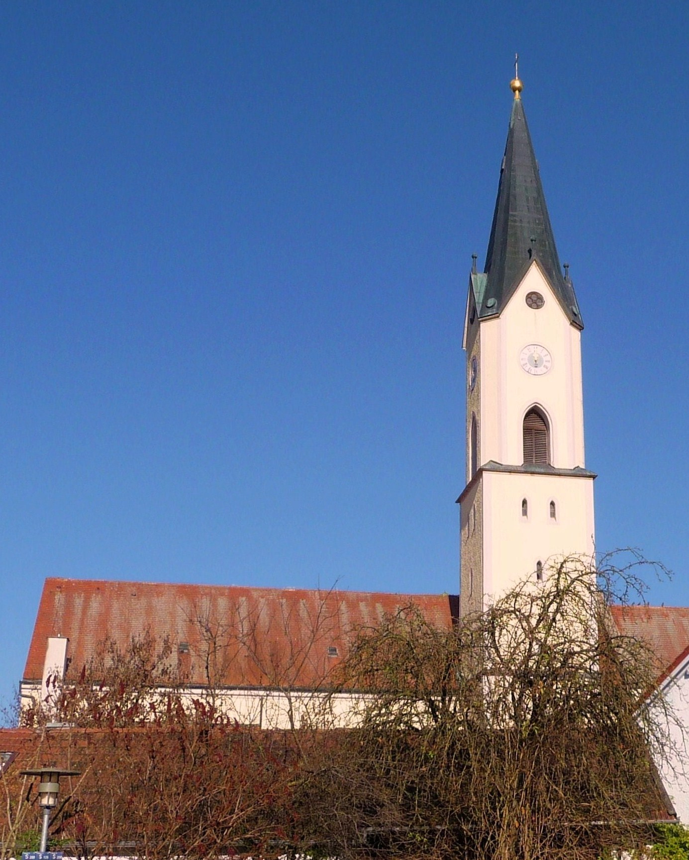 Die Pfarrkirche St. Peter in Hartkirchen am Inn